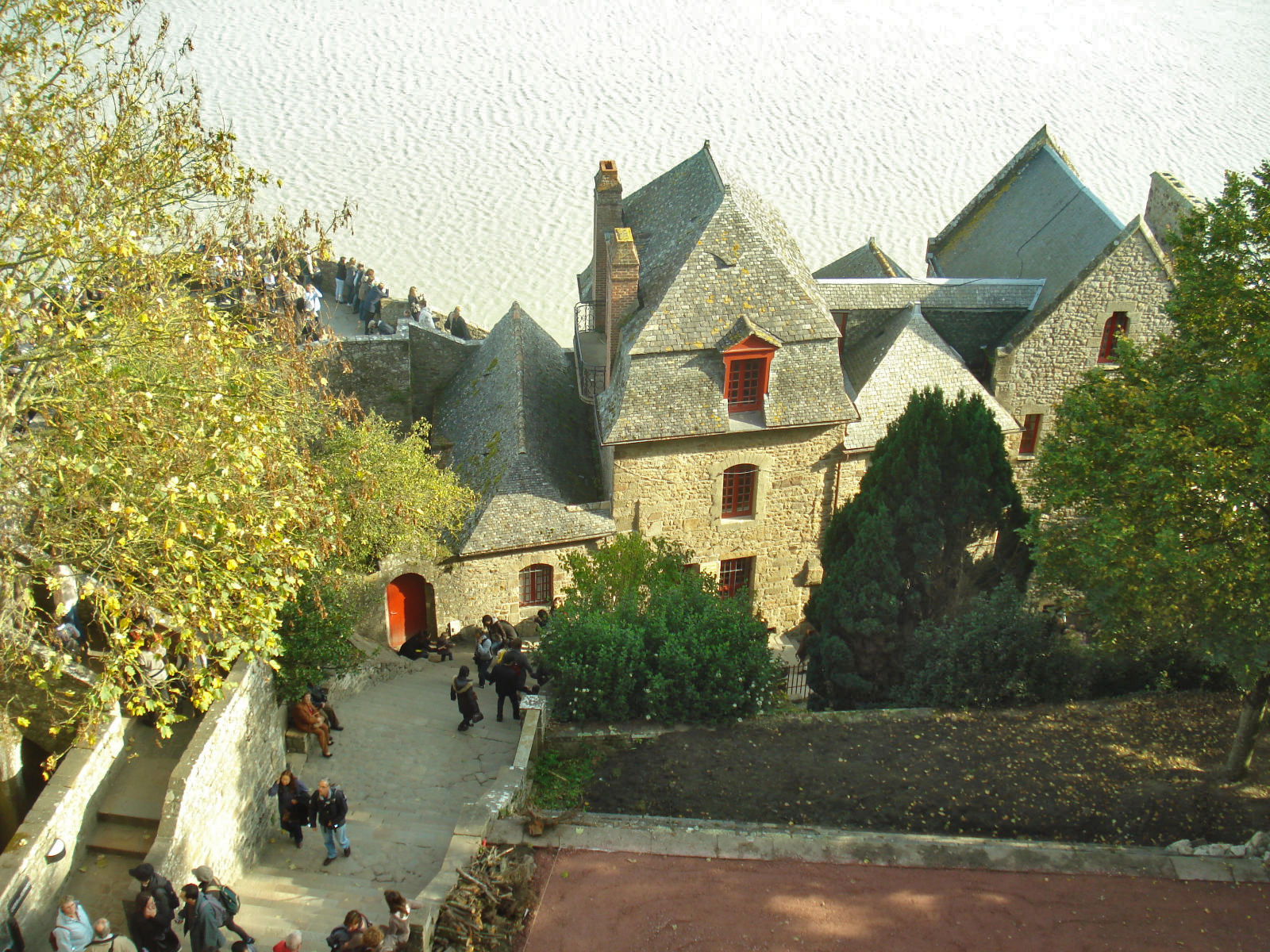 Mont-Saint-Michel - Novembre 2011